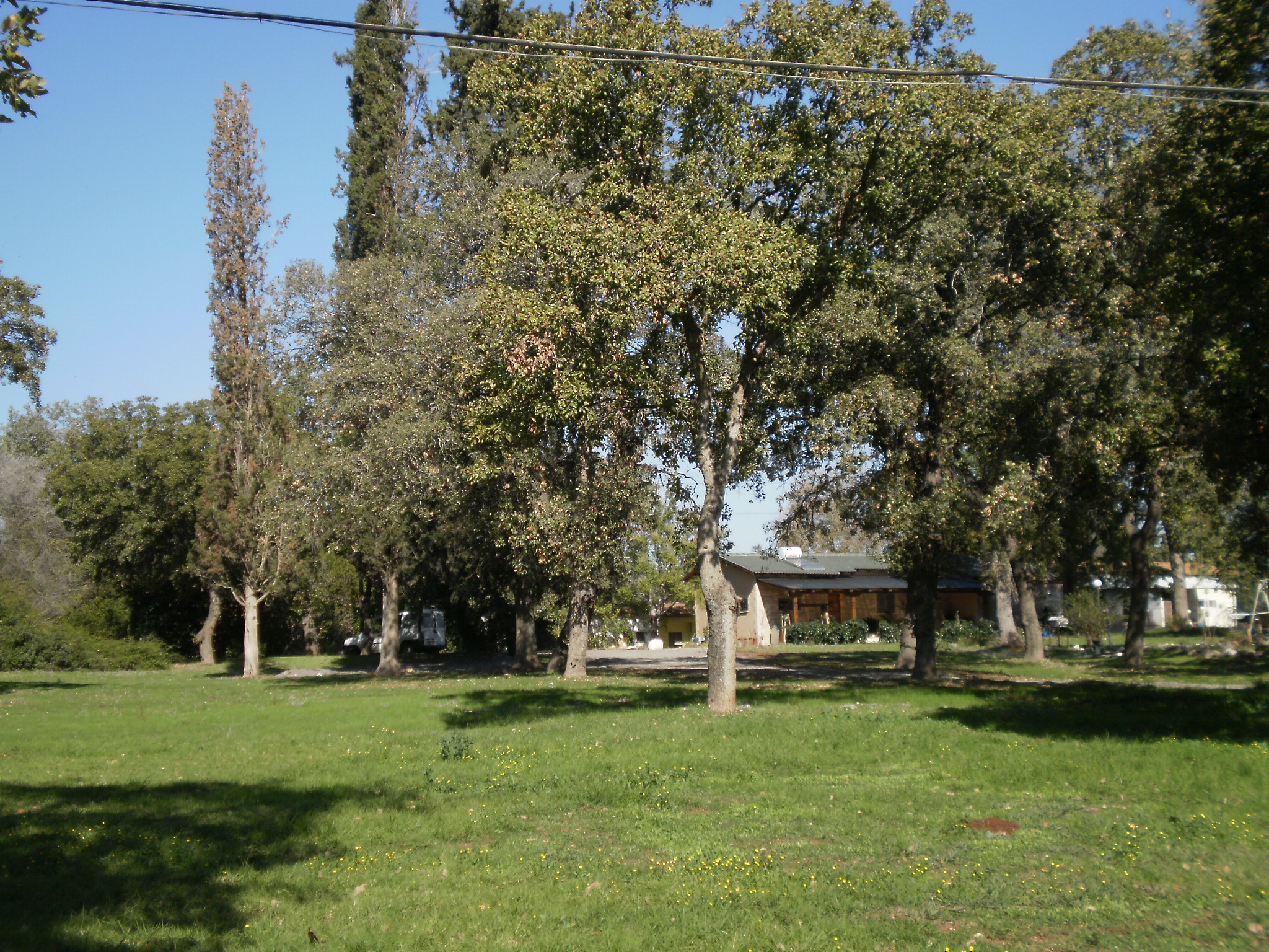 kibbutz Hasolelim, Israel קיבוץ הסוללים, ישראל